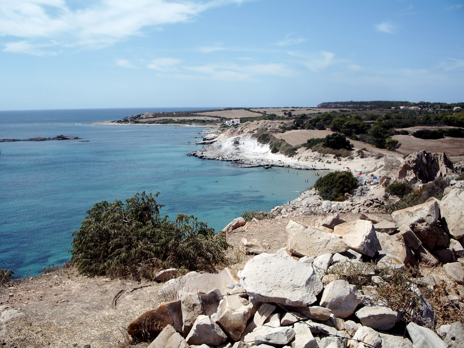 Spiaggia sull'isola di S.Pietro